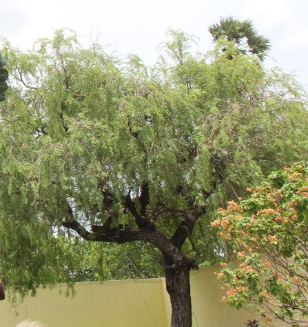 வன்னிமரம்